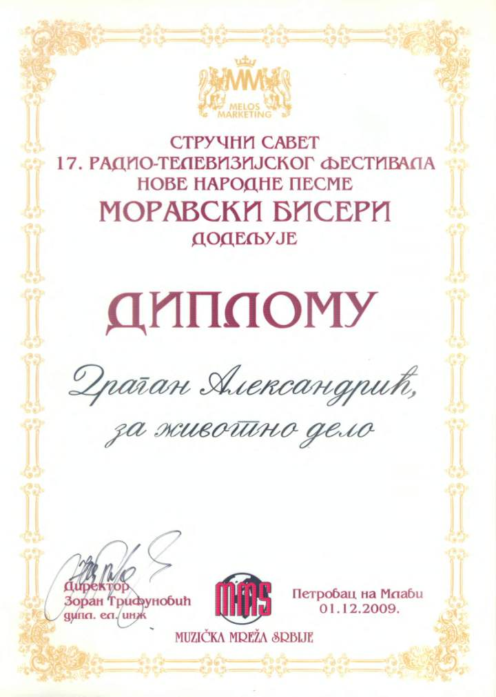 Српски (ћирилица): стручни савет 17. радио-телевизијског фестивала нове народне песме Моравски бисери, признање Драгану Александрићу за животно дело